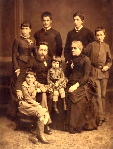 Родина Алчевських: у центрі – Олексій Алчевський, Христина Алчевська; зліва-направо – Іван (сидить), Ганна, Григорій, Дмитро, Микола; на колінах – молодша донька Христя. Фото 1880-х років